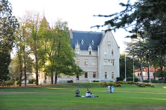 légende Parc et château du Vivier à Écully